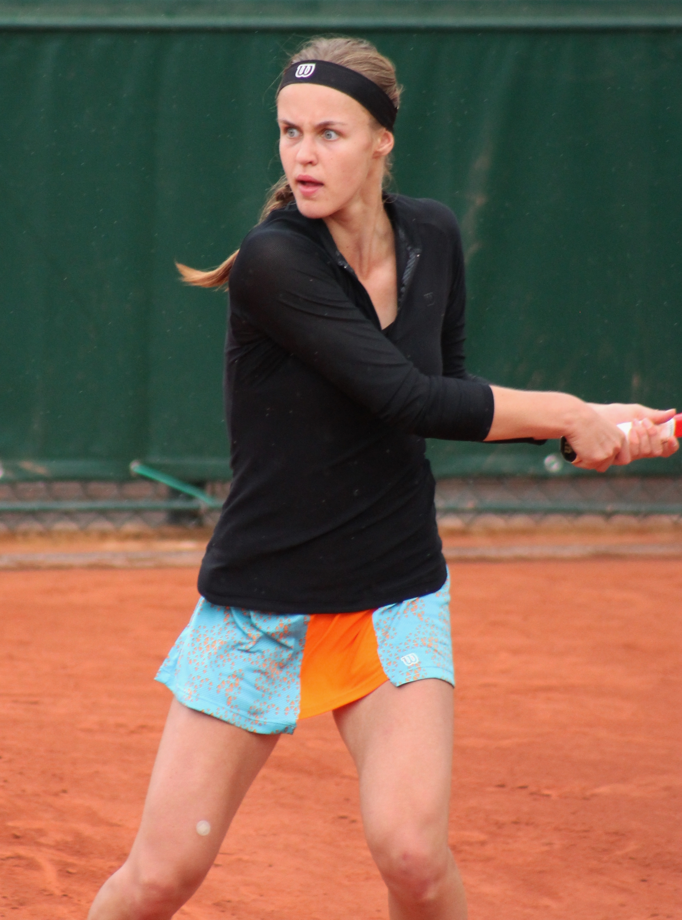 Schmiedlova RG13 (7)